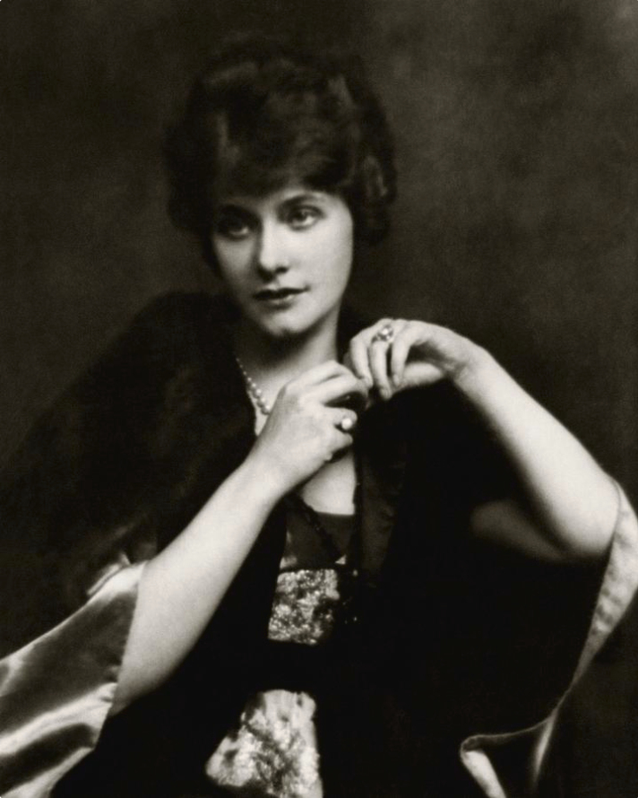 Elsie Ferguson, portrait photograph